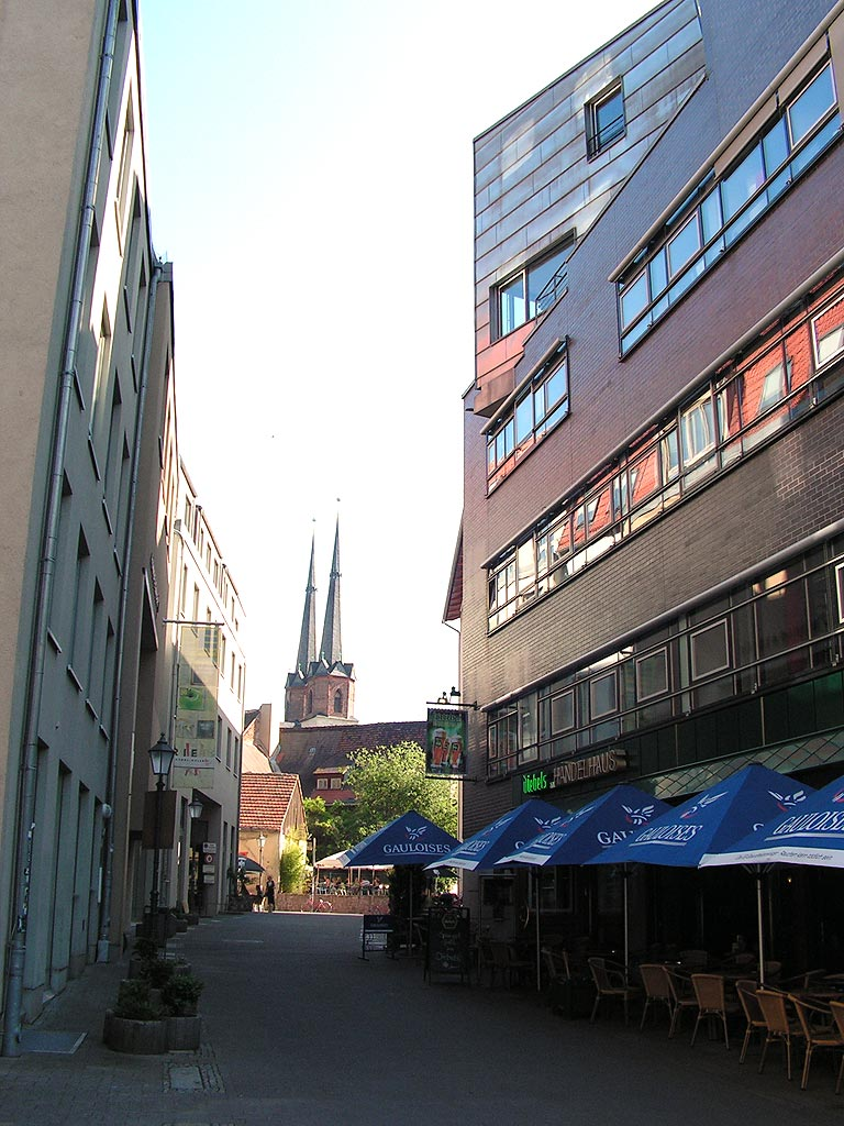 Twintowers of the Marien-Church in Halle, Kleine Marktstrasse, Diebels am Händelhaus